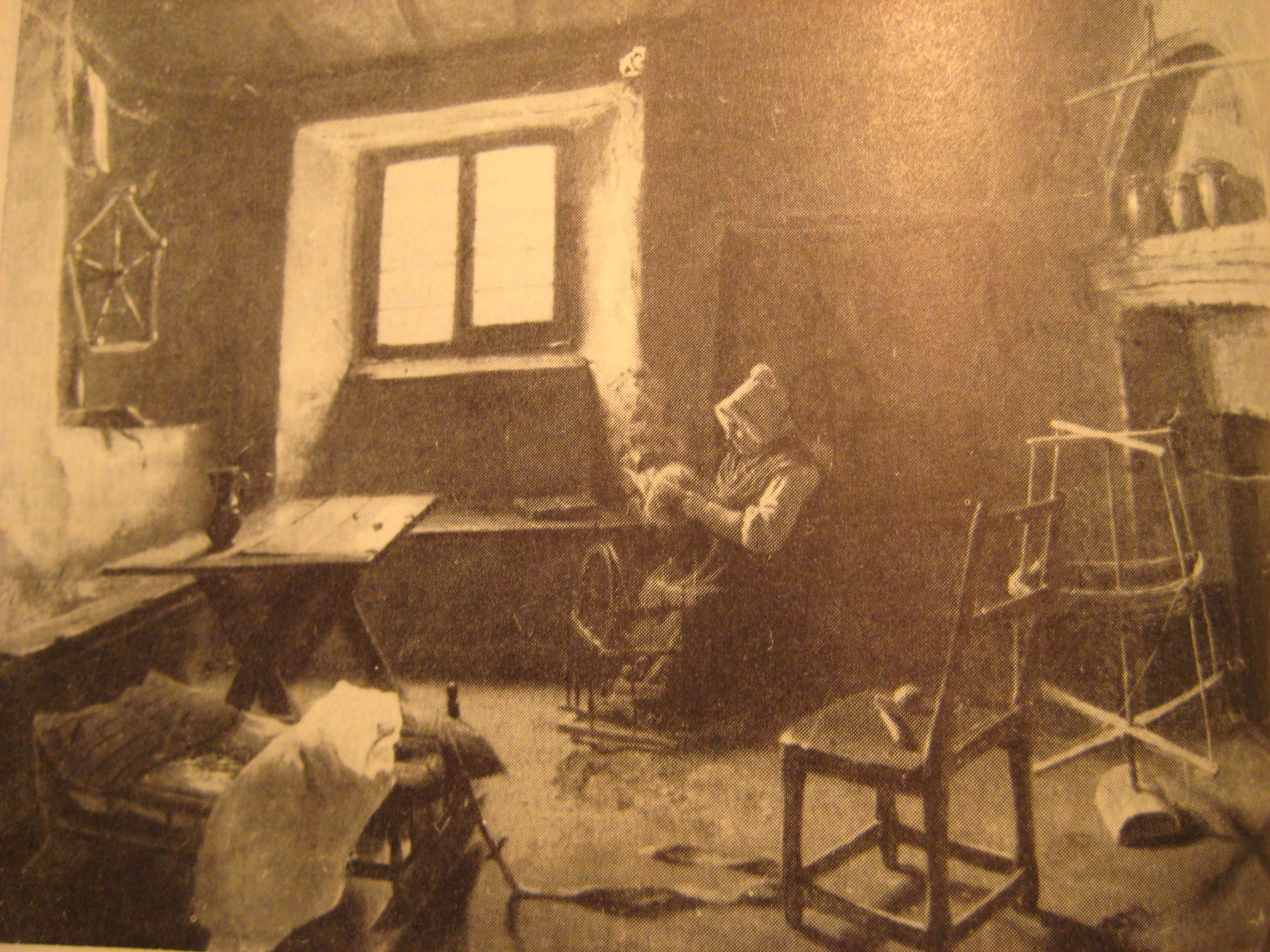 Moler Mathias Kirsch (1797-1872): Bauerekichen Source:Jos Flies (Ettelbruck)